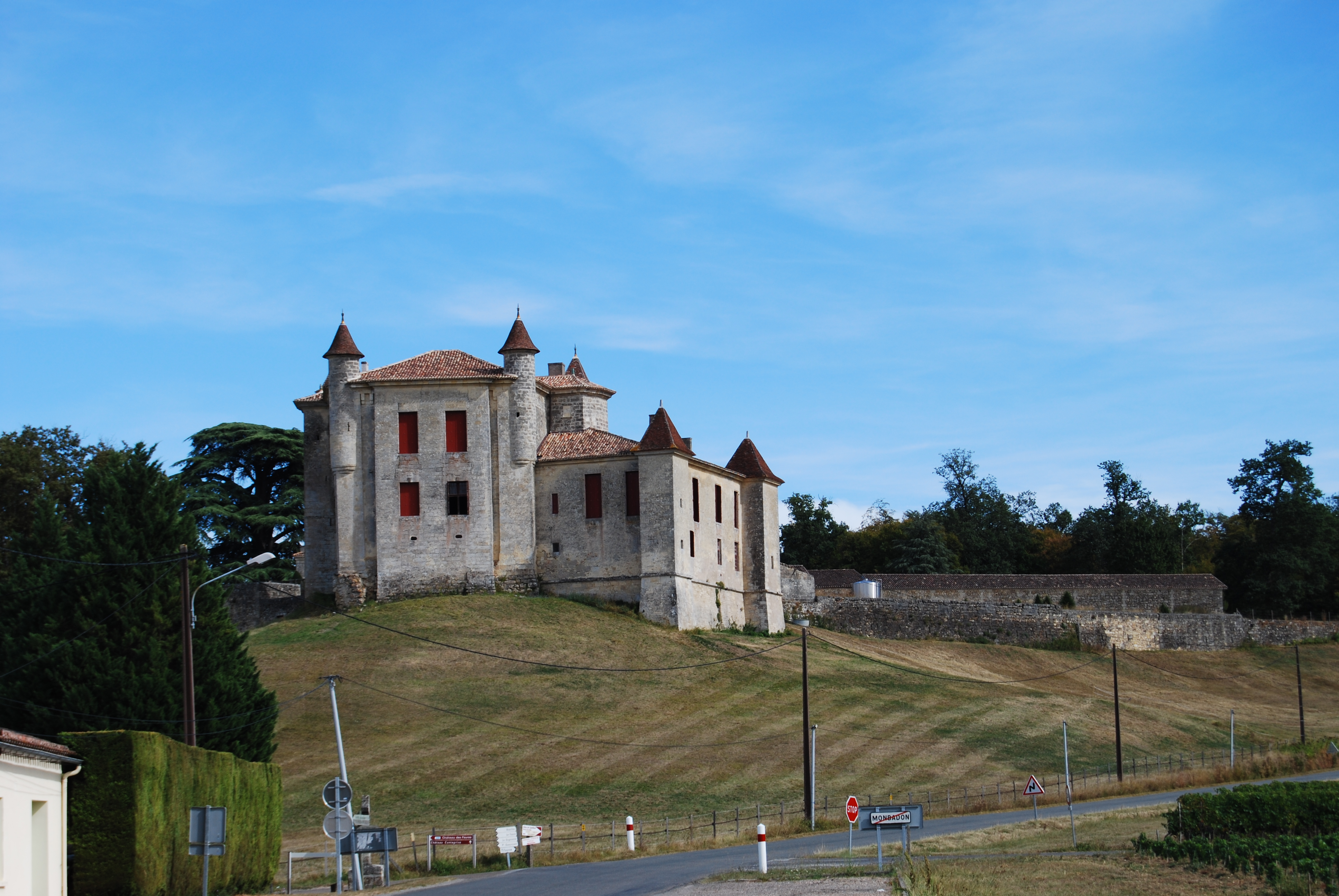 Château de Monbadon (Puisseguin, France), (Inscrit, 1964) .